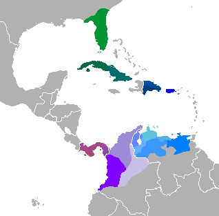 Subvariedades dialecteles del español caribeño